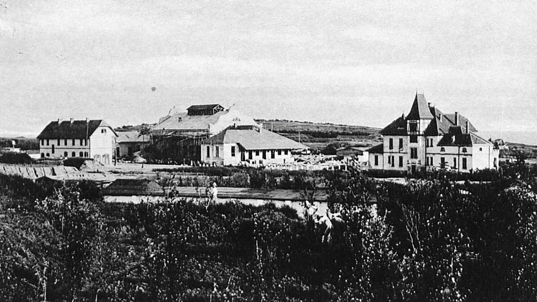 青岛督署洗衣房